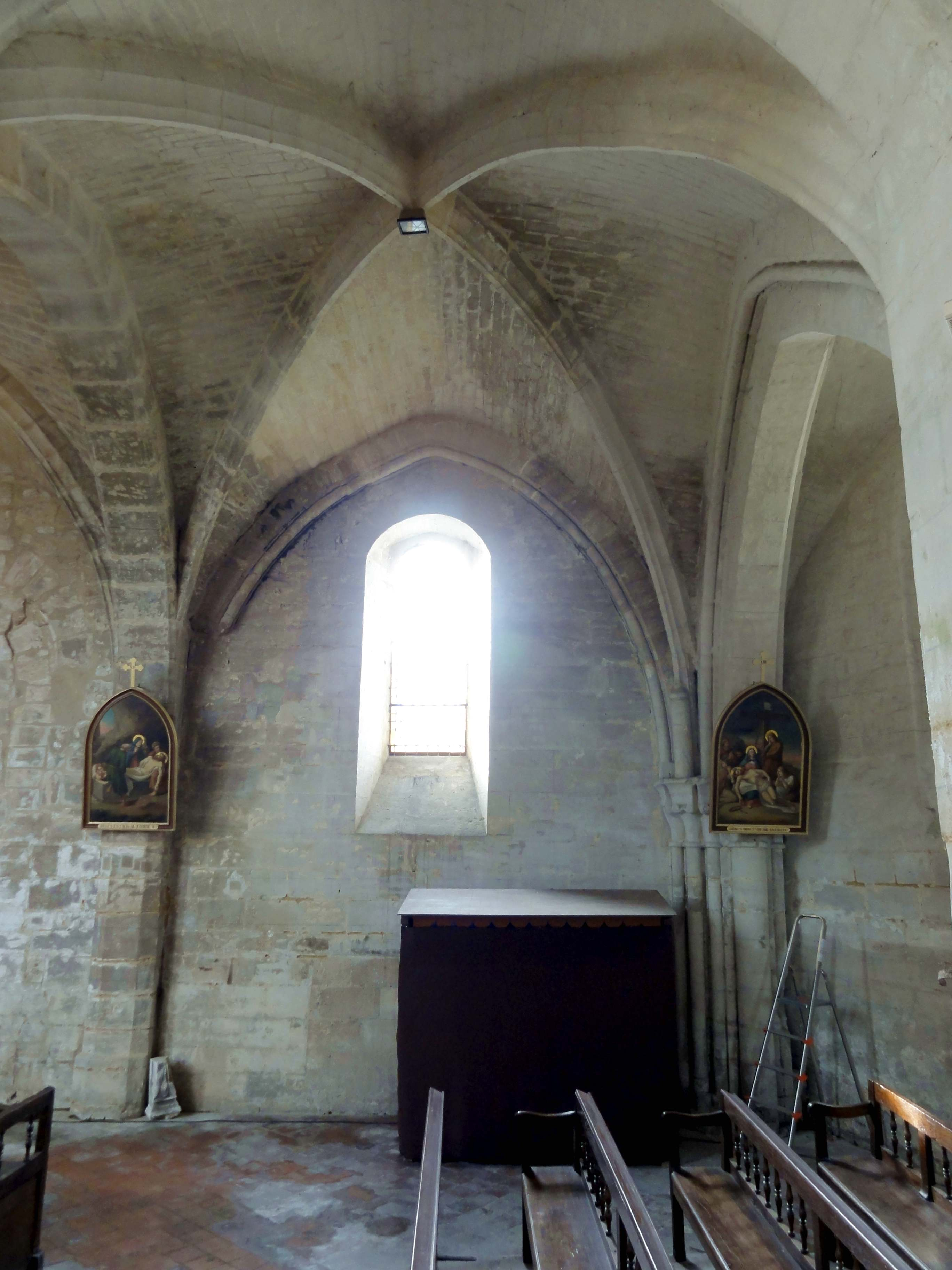 Voir titre.